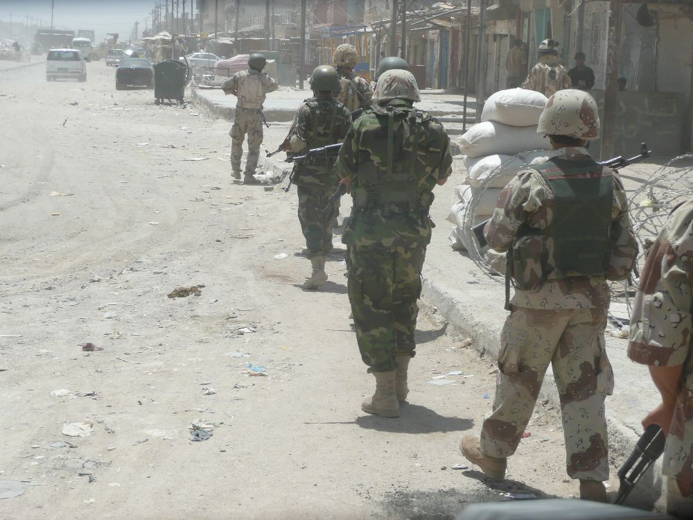 بعض افراد الجيش العراقي في منطقة خمسه ميل بمحافظة البصرة جنوب العراق